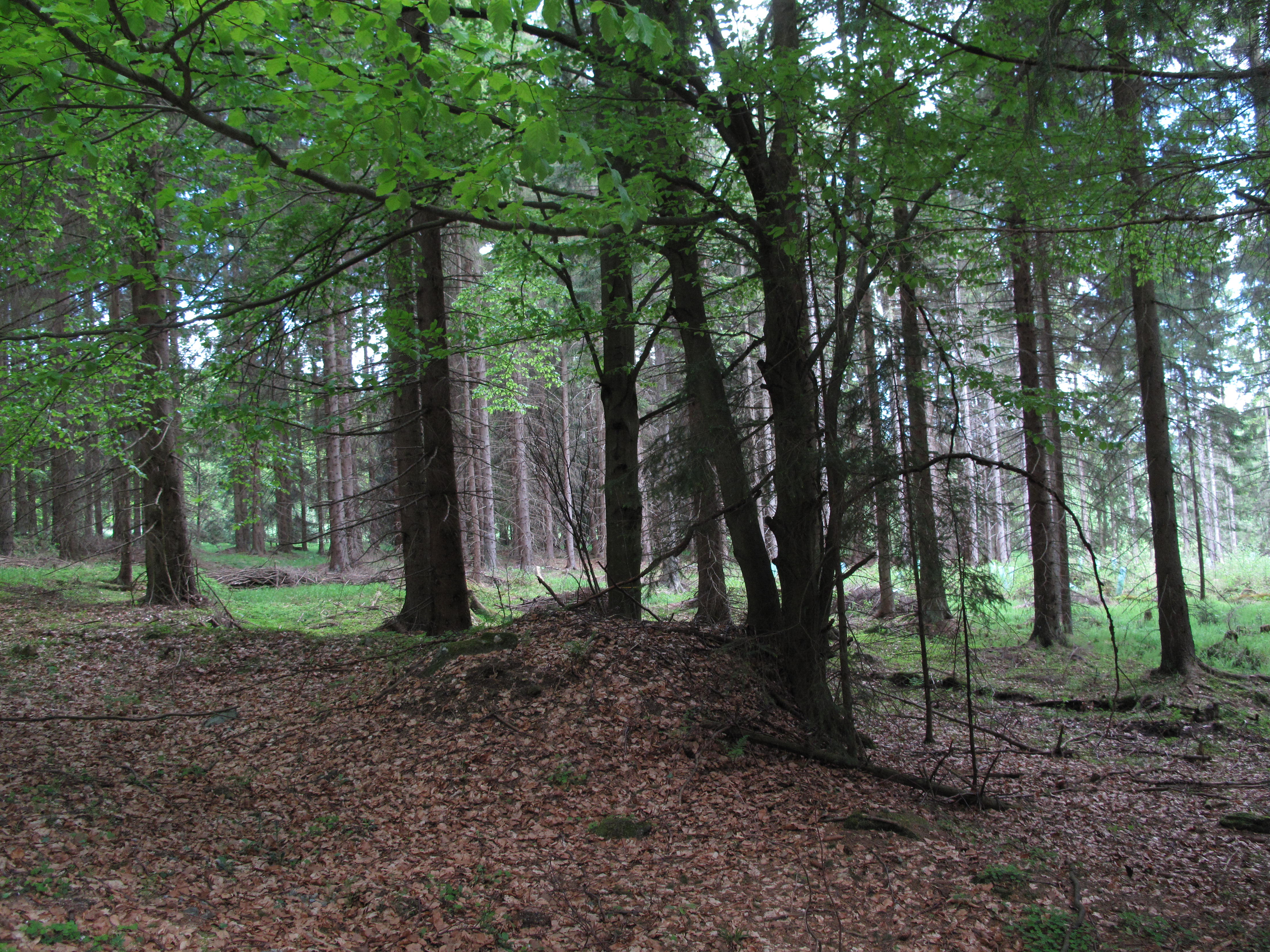 Česky: Přírodní památka Úval Dolní Přibrání